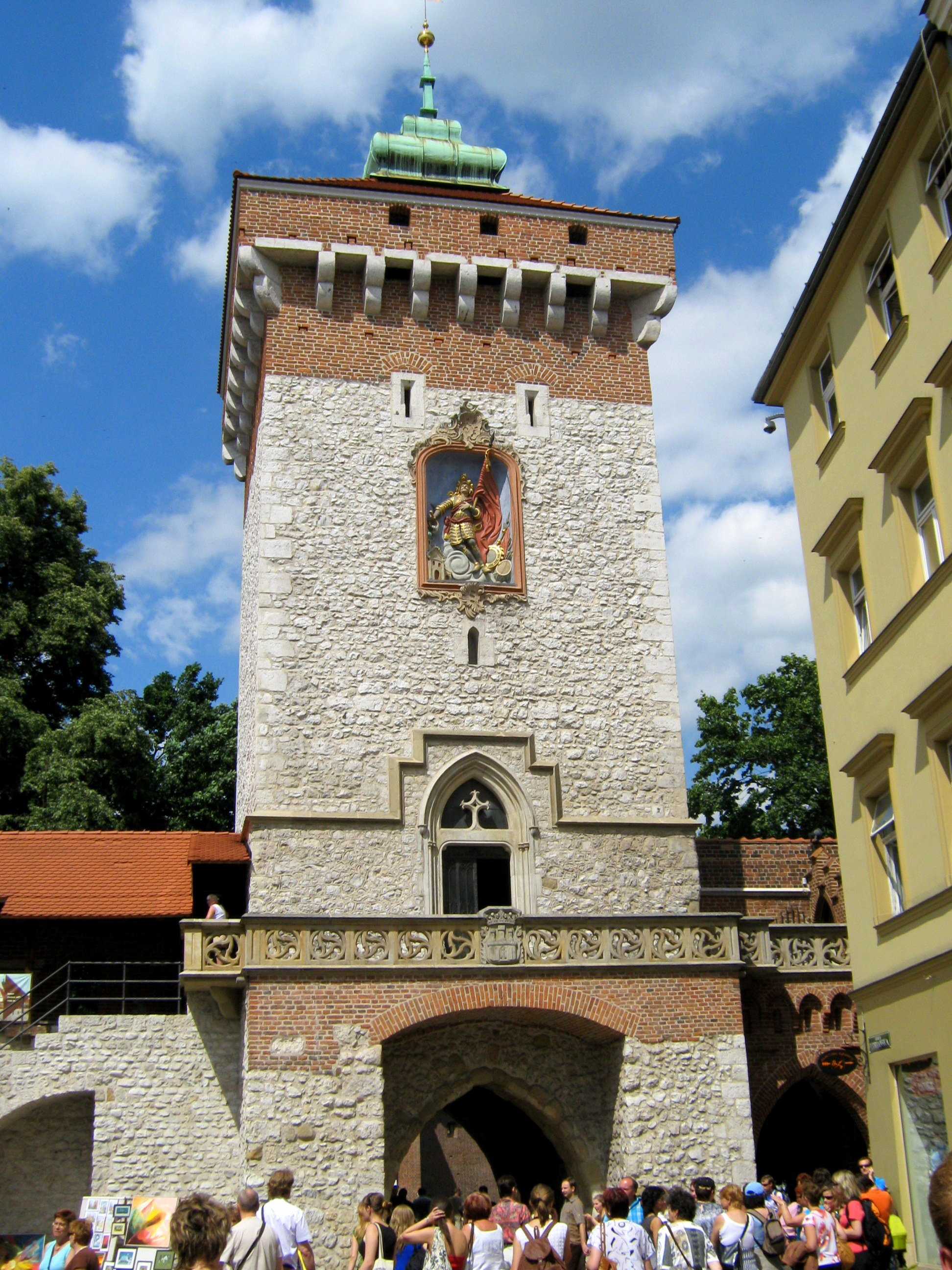 Kraków, Brama Floriańska, XIV, 1694